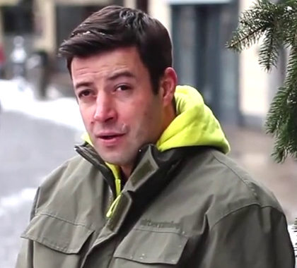 Klemen Klemen